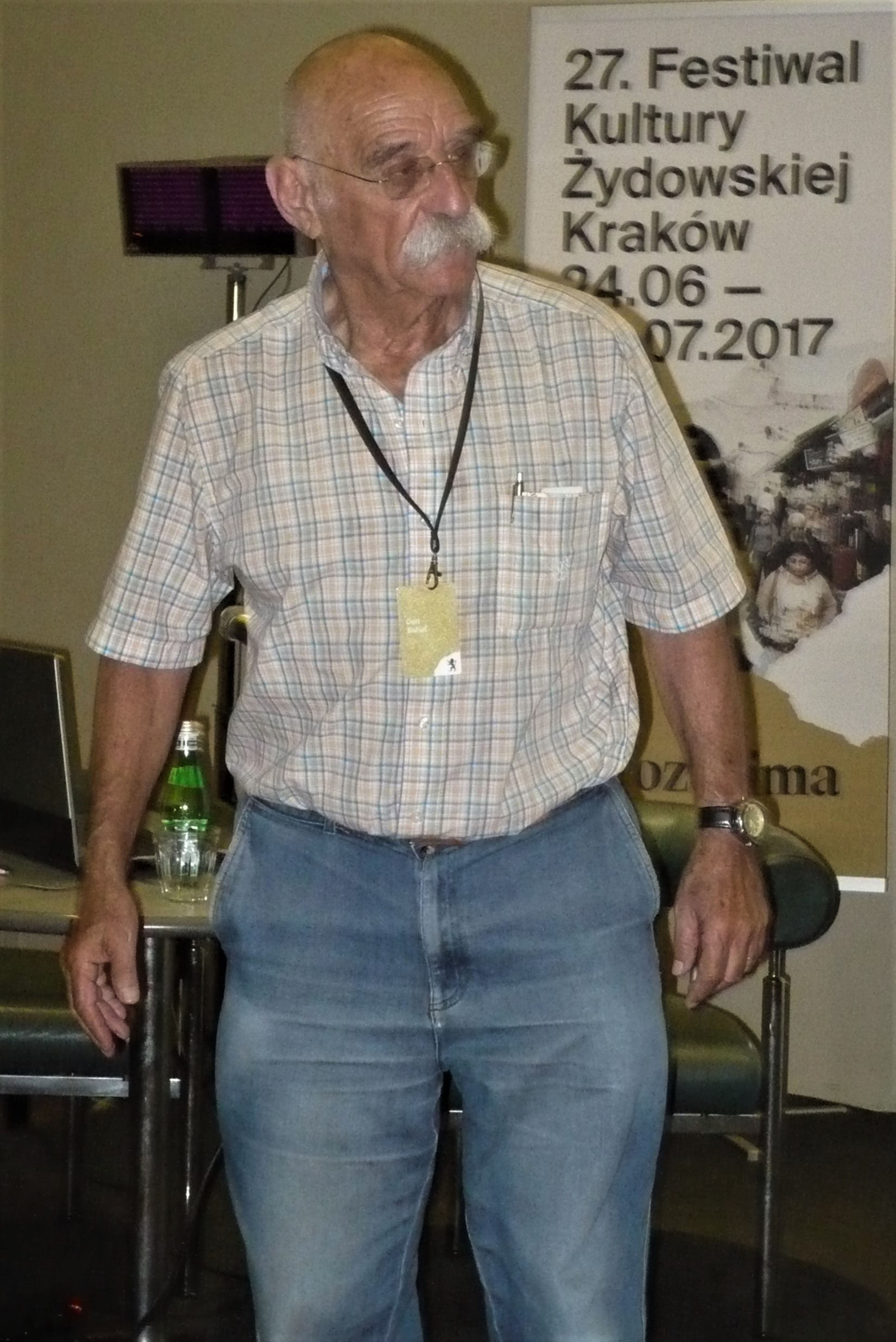 Dan Bahat